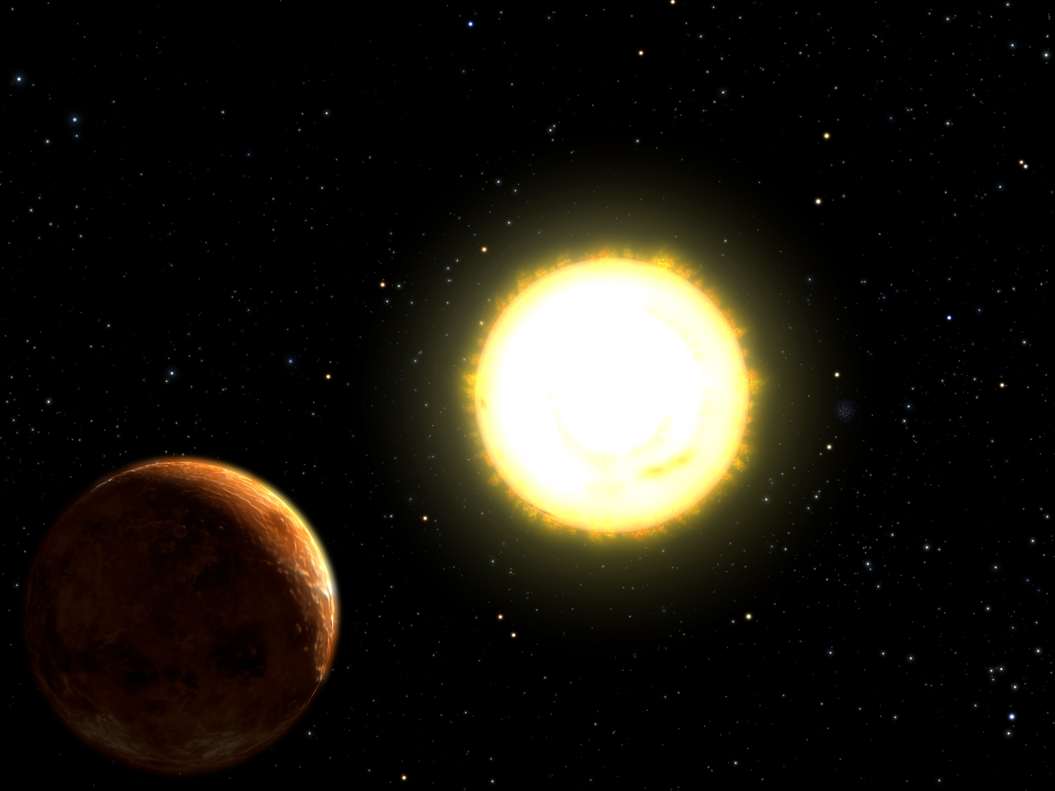 Vue d'artiste de 55 Cancri E Ce fichier est dans le domaine public parce qu'il a été créé par la NASA Source de l'image : "Les documents créés par la NASA ne sont pas protégés par les droits d'auteur sauf mention contraire". (NASA copyright policy).